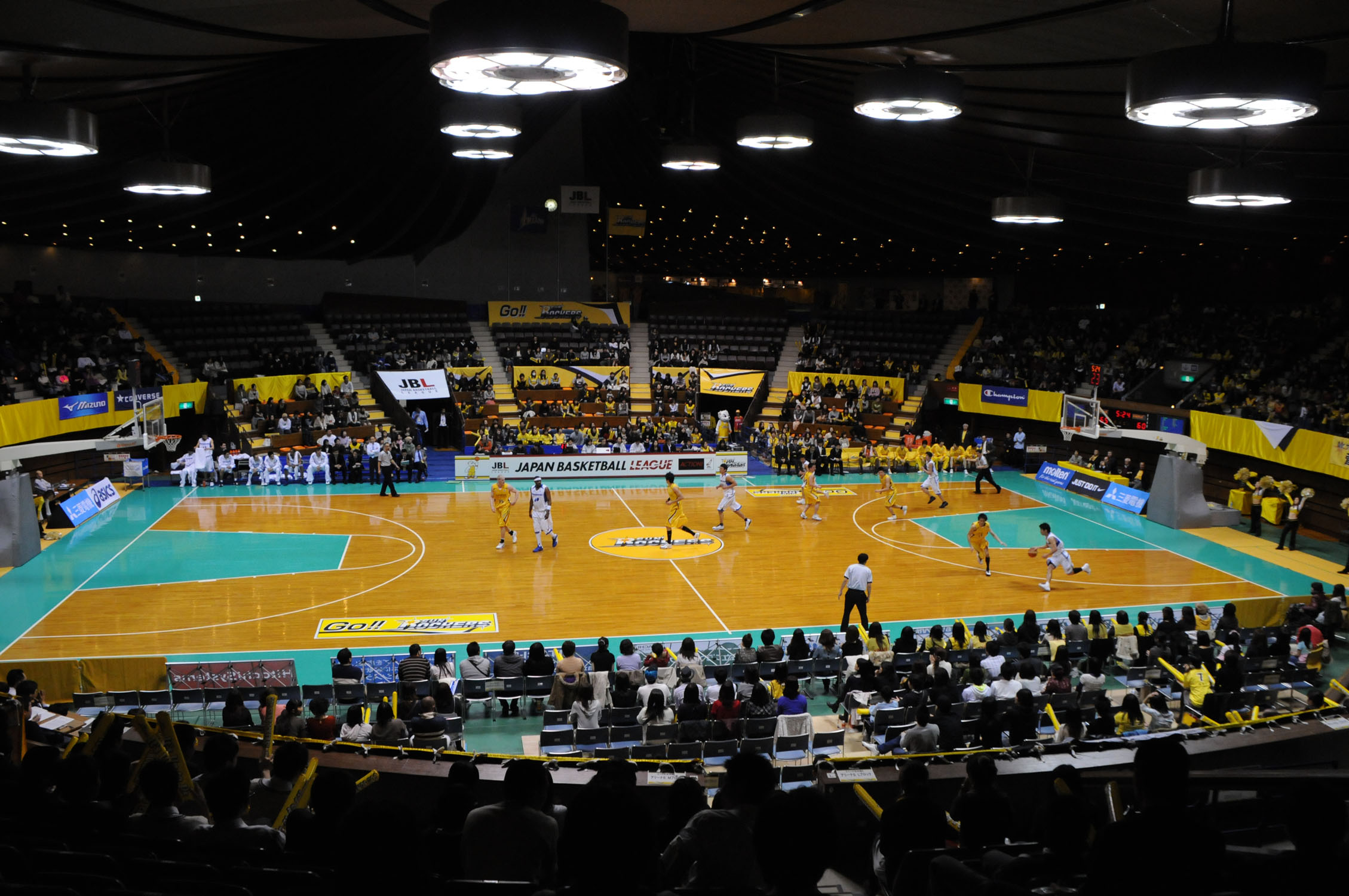 国立代々木競技場、第二体育館、2009年2月14日。